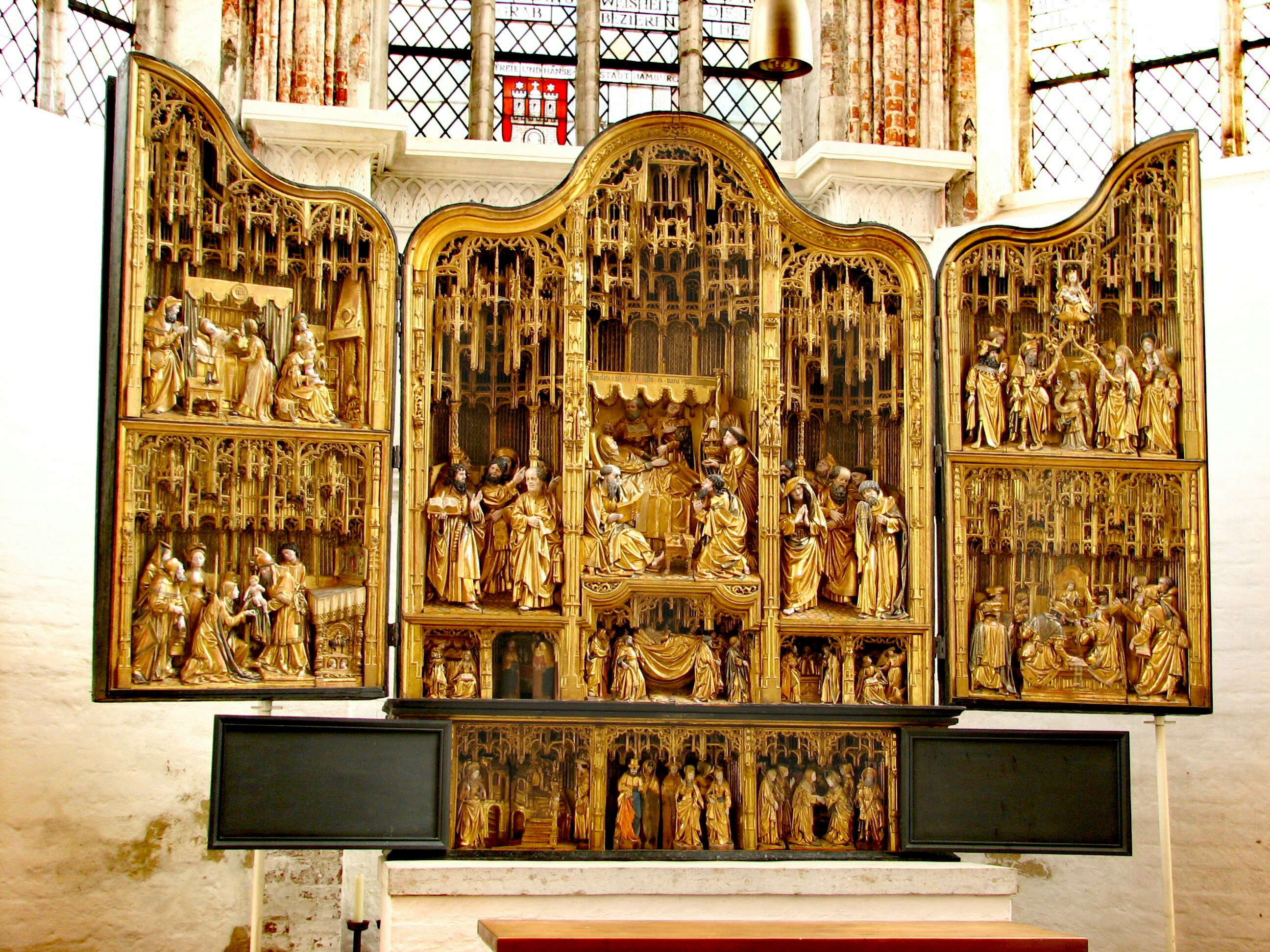 Antwerpener Retabel in der Marienkirche zu Lübeck, Marienretabel von 1518 in der Marientidenkapelle der Marienkirche (Lübeck). Das Zentralbild zeigt den Marientod.